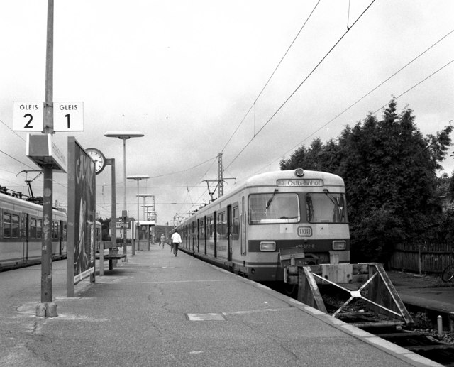 Herrsching S-bahn station